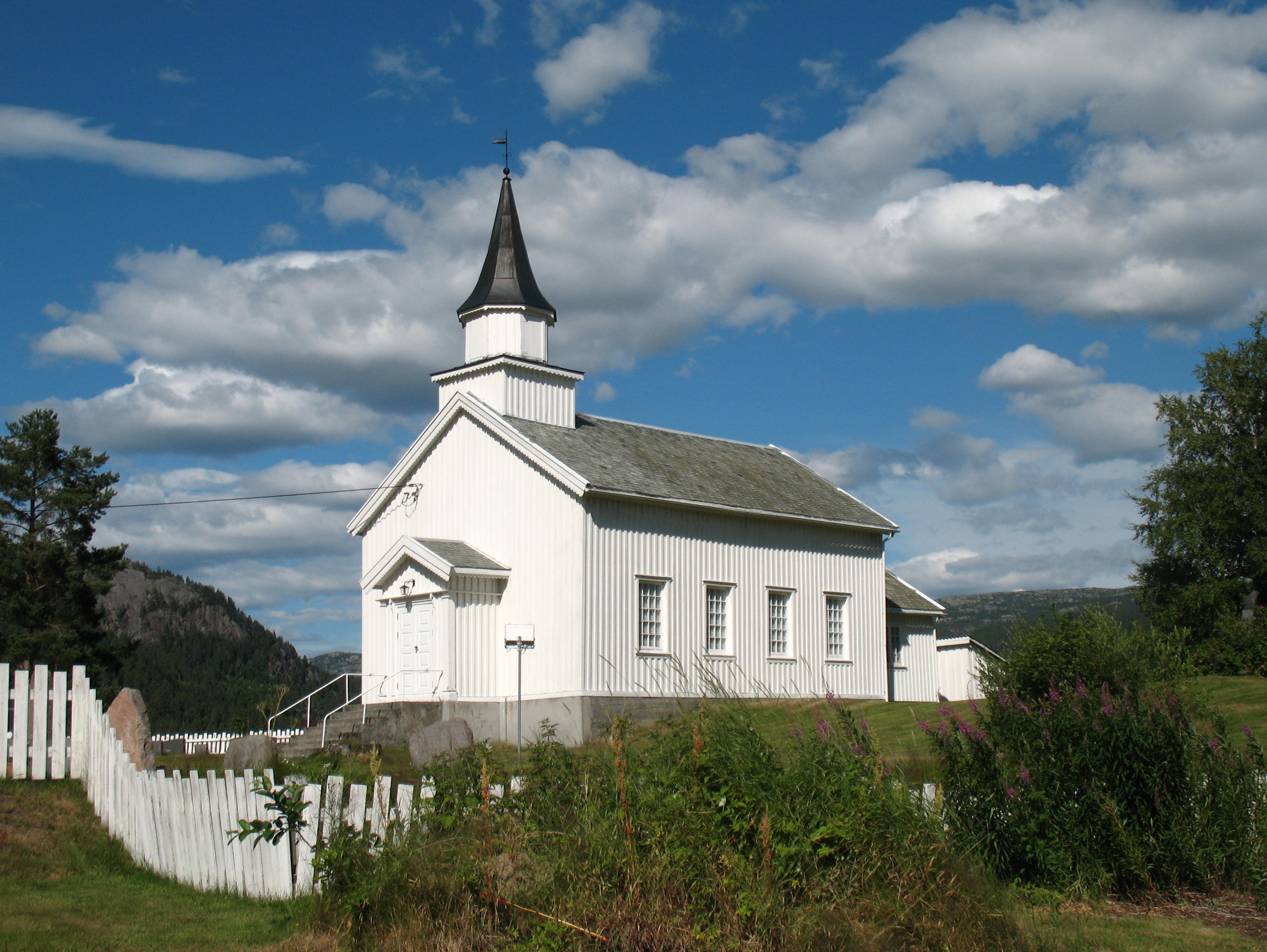 Åknes kapell bygd 1873 i Åseral kommune, Vest-Agder. Arkitektar er Tobias Flottorn og Gard Ekså. Kapellet og kyrkjegarden sett frå sørvest.